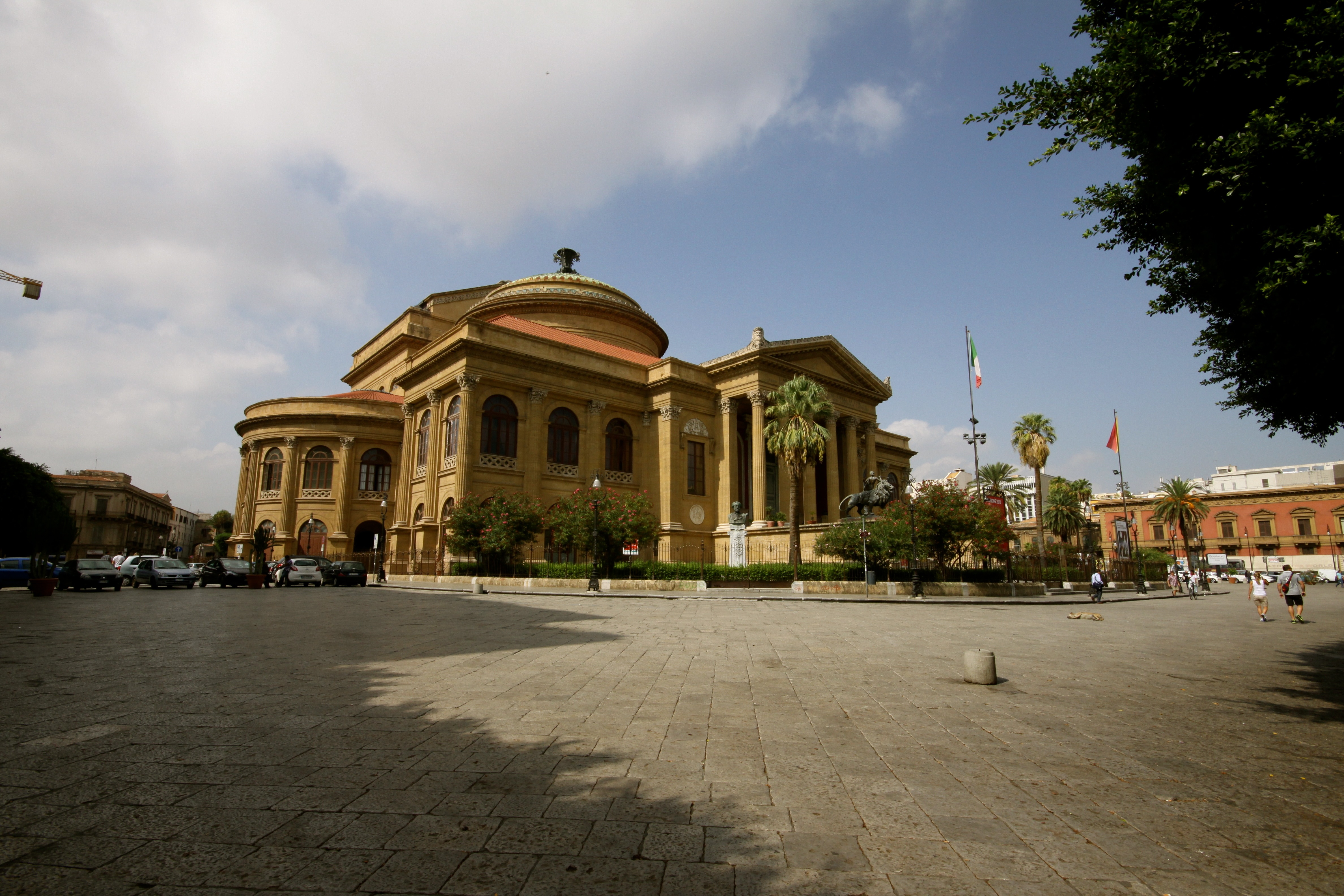 Teatro Massimo (Palermo)